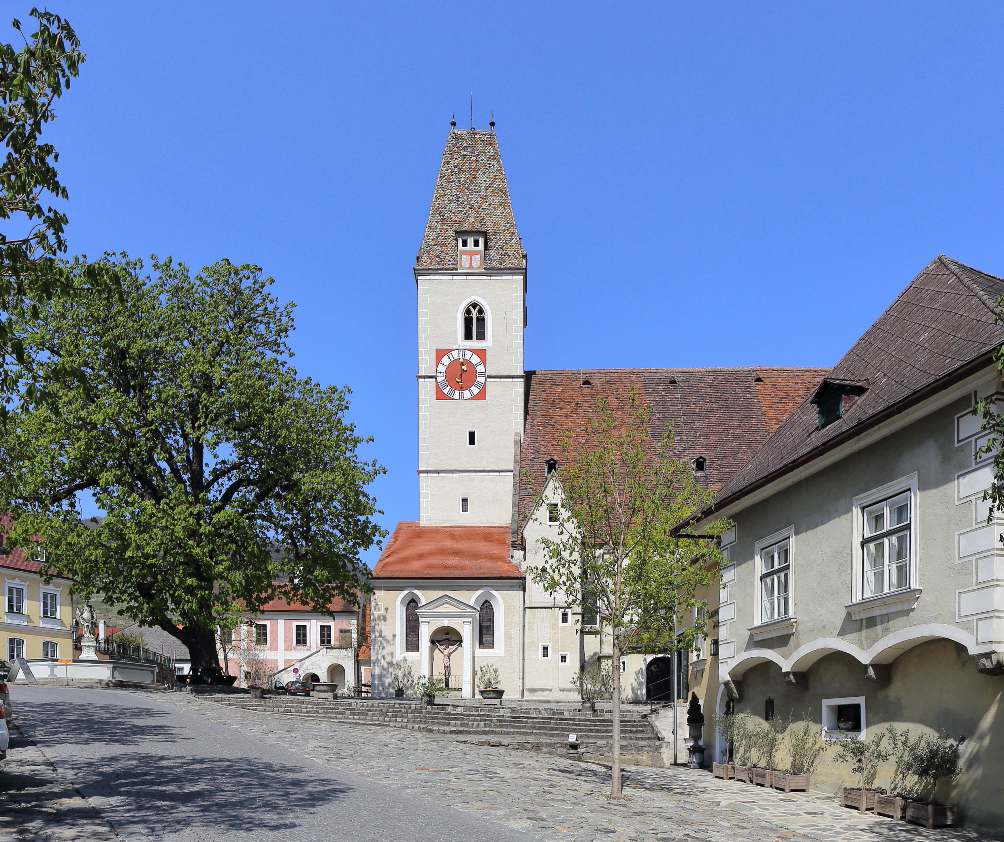 Ortszentrum der niederösterreichischen Marktgemeinde Spitz an der Donau.Links im Bild der Dorfbrunnen aus dem 18. Jahrhundert. Im Anschluß ein seit 1981 als Naturdenkmal deklarierter Kastanienbau. Dahinter das denkmalgeschützte Placidusstöckel. Im Bildzentrum die ortbildbeherrschende spätgotische Pfarrkirche hl. Mauritius und rechts der denkmalgeschützte Mauritiushof, ein Bauwerk aus dem 16. Jahrhundert. This media shows the natural monument in Lower Austria with the ID KR-065.